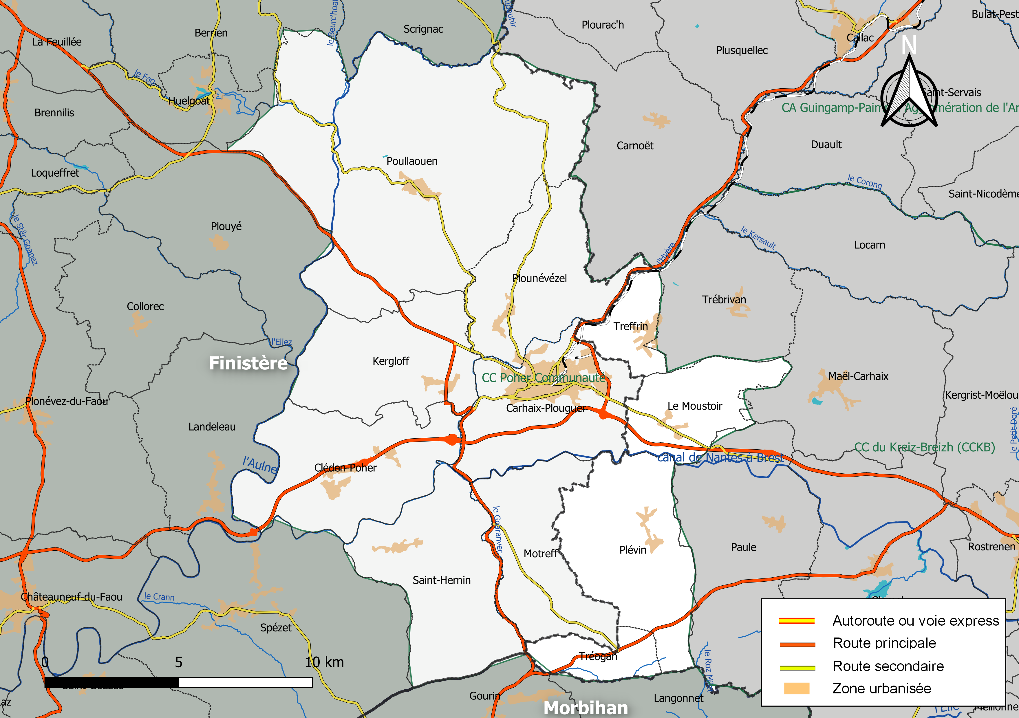 Carte géographique de la Communauté de communes Poher communauté, département du Finistère, France. Composition au 1er janvier 2019.